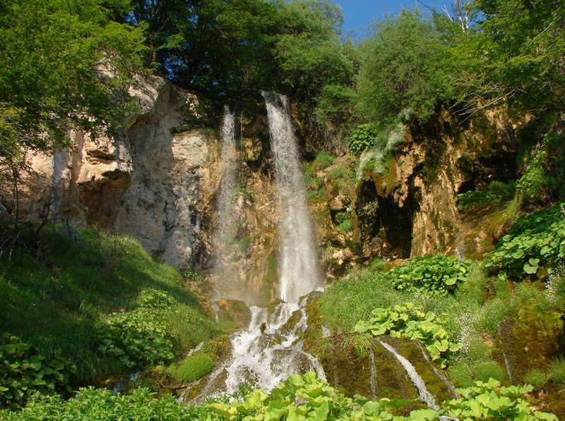 Српски (ћирилица): Сопотнички водопади